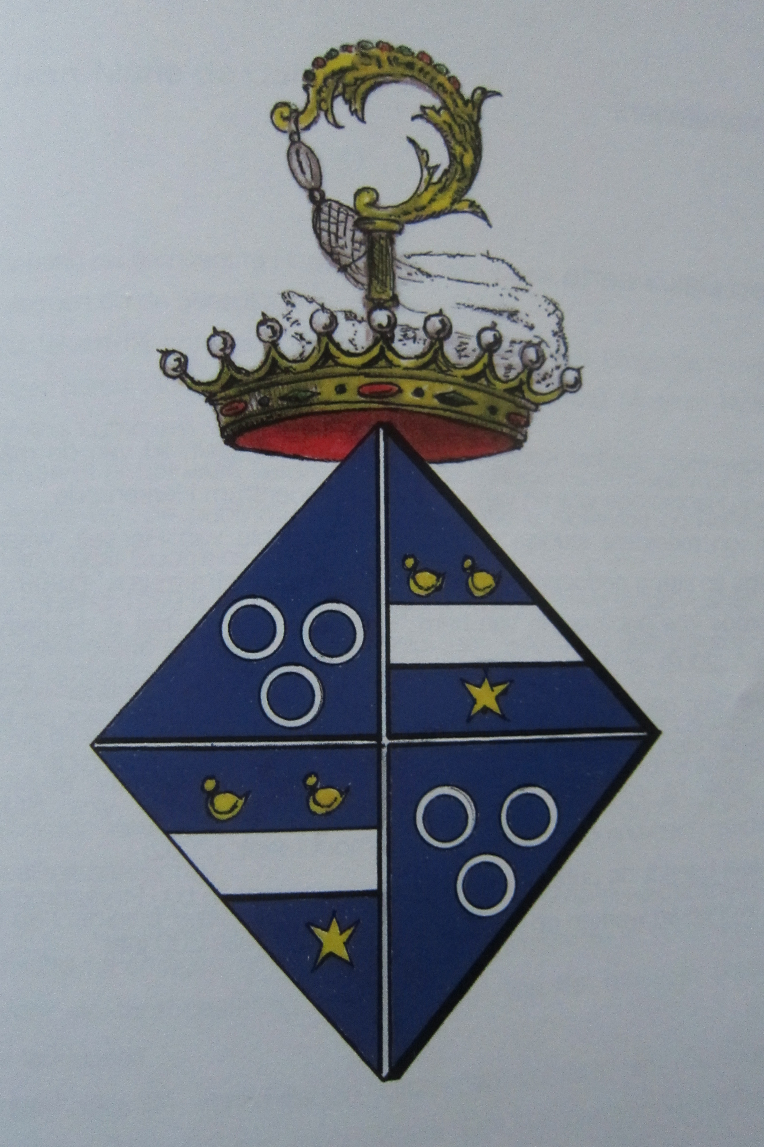 Heraldisch wapen Josephine de Gondrecourt, abdis abdij van Herkenrode te Kuringen, BelgiË